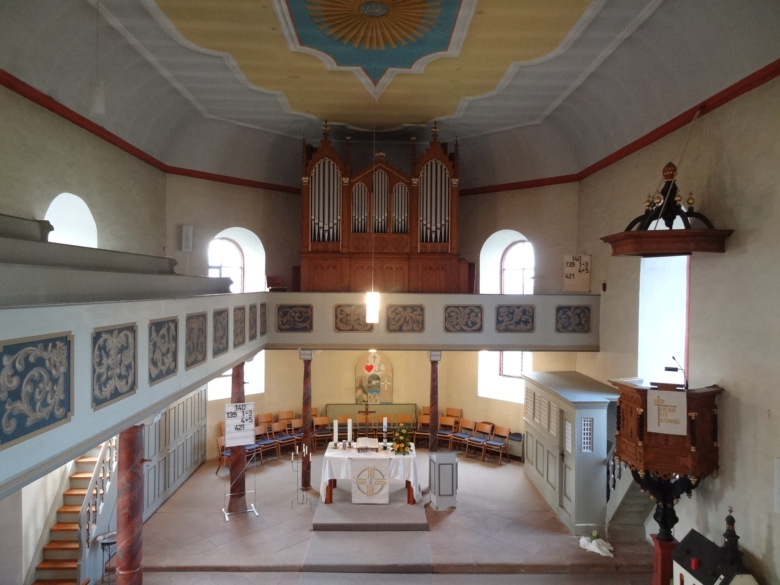 Evangelische Kirche (Fauerbach vor der Höhe)